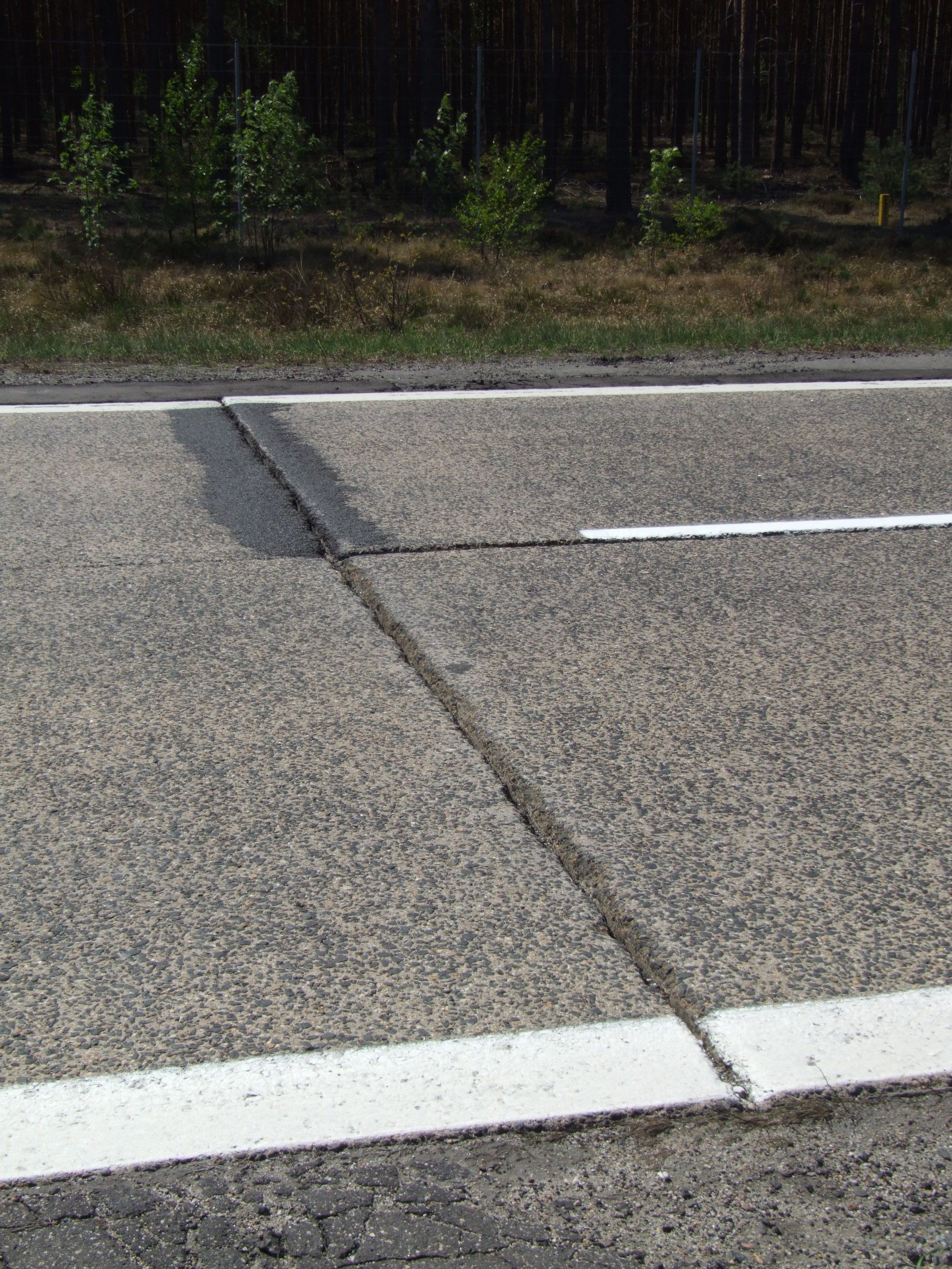 DK 18 Strasse in Polen (Reichsautobahn RAB 9 Berlin-Breslau)